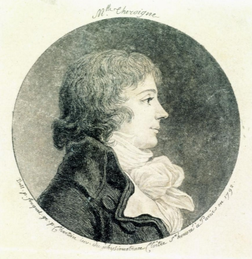 Portrait dessiné par Jean Fouquet et gravé par Gilles-Louis Chrétien, inventeur du physionotrace.